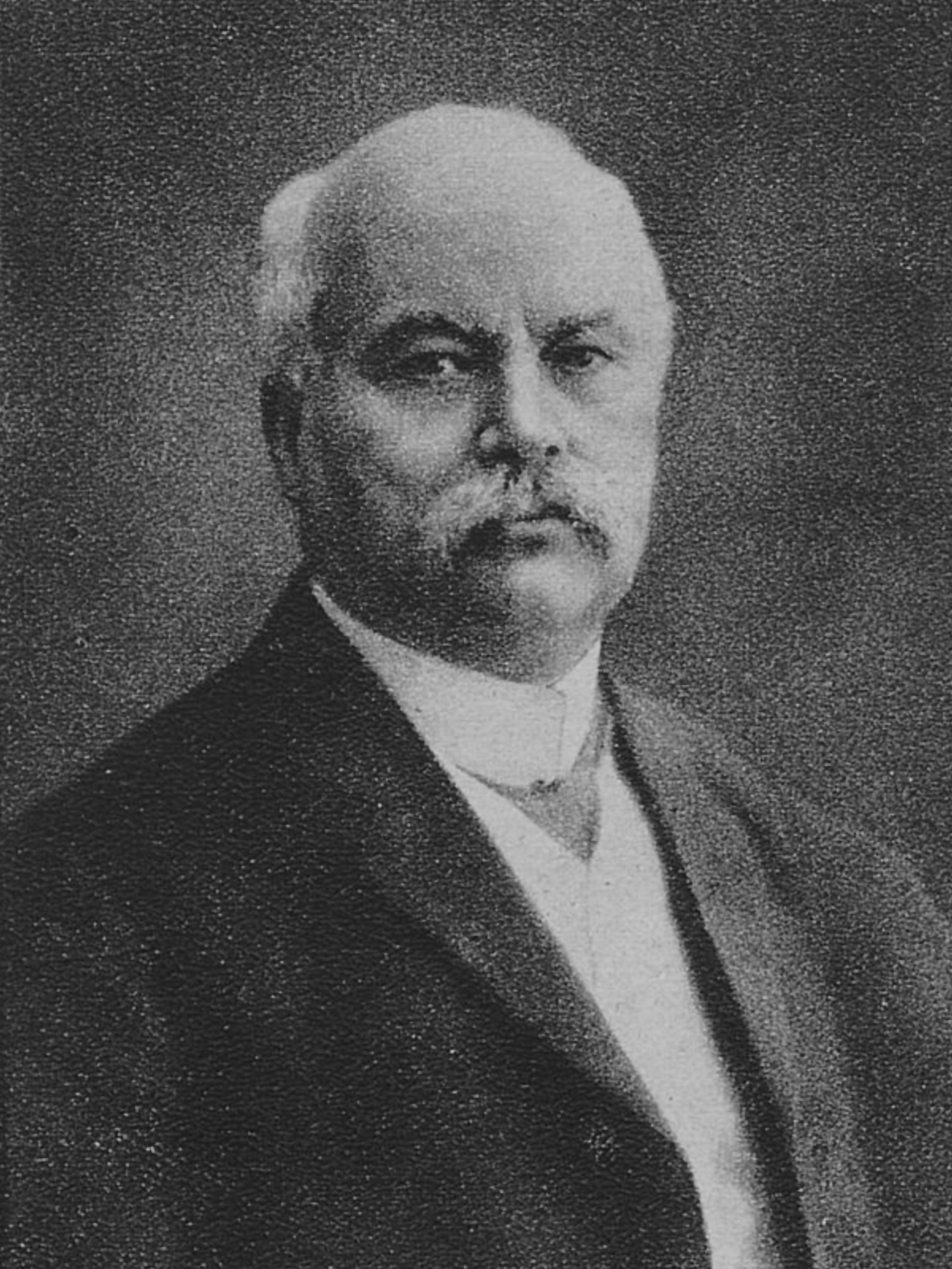 Friedrich Marx (Philologe) – Geh. Reg.-Rat Dr. phil. Friedrich Marx, der neue Rektor der Universität Bonn für das nächste Schuljahr (1917)